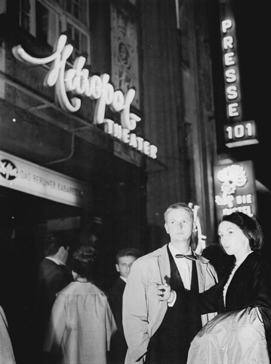 Berlin, Passanten, Metropol-Theater Zentralbild Franke 8.10.1966 X. Berliner Festtage 1966 Einen abendlichen Rummel durch Berlin unternahmen Sabine und Michael Langer aus Dresden, die während der X. Berliner Festtage die Hauptstadt der DDR besuchen.